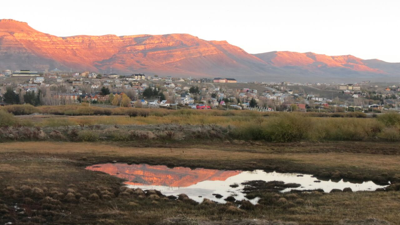 El cerro que rodea a el Calafate iluminada por la tenue luz del sol.Cerro Calafate